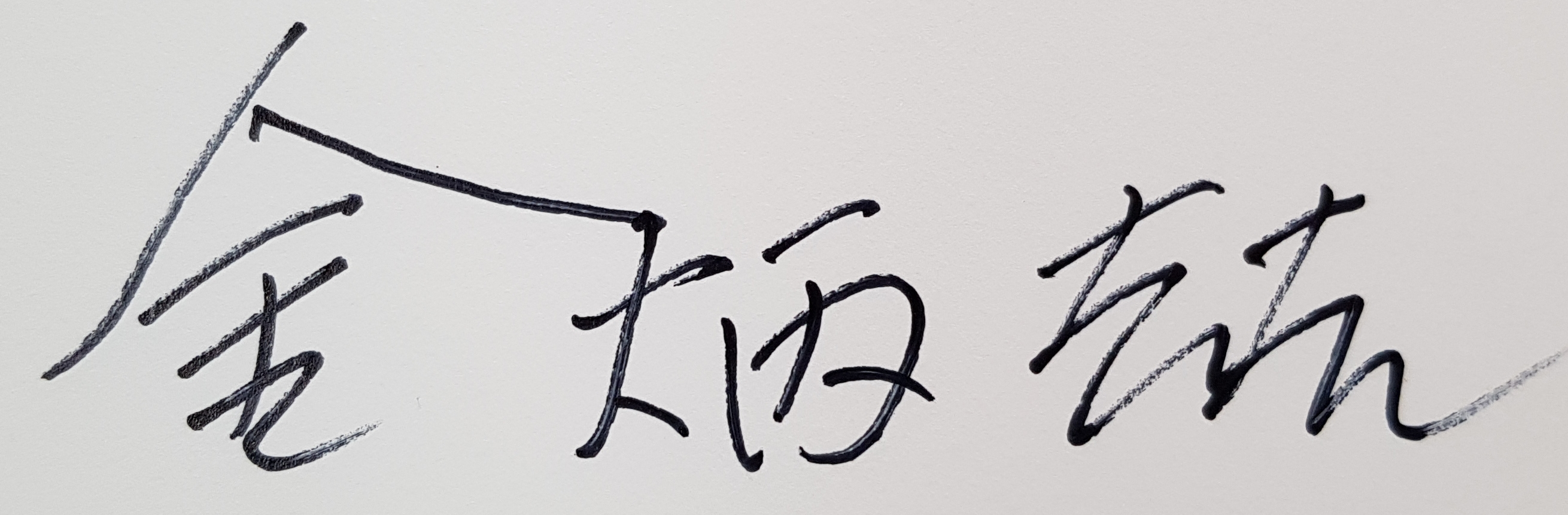 김병철 회장의 한자 필체 2016년